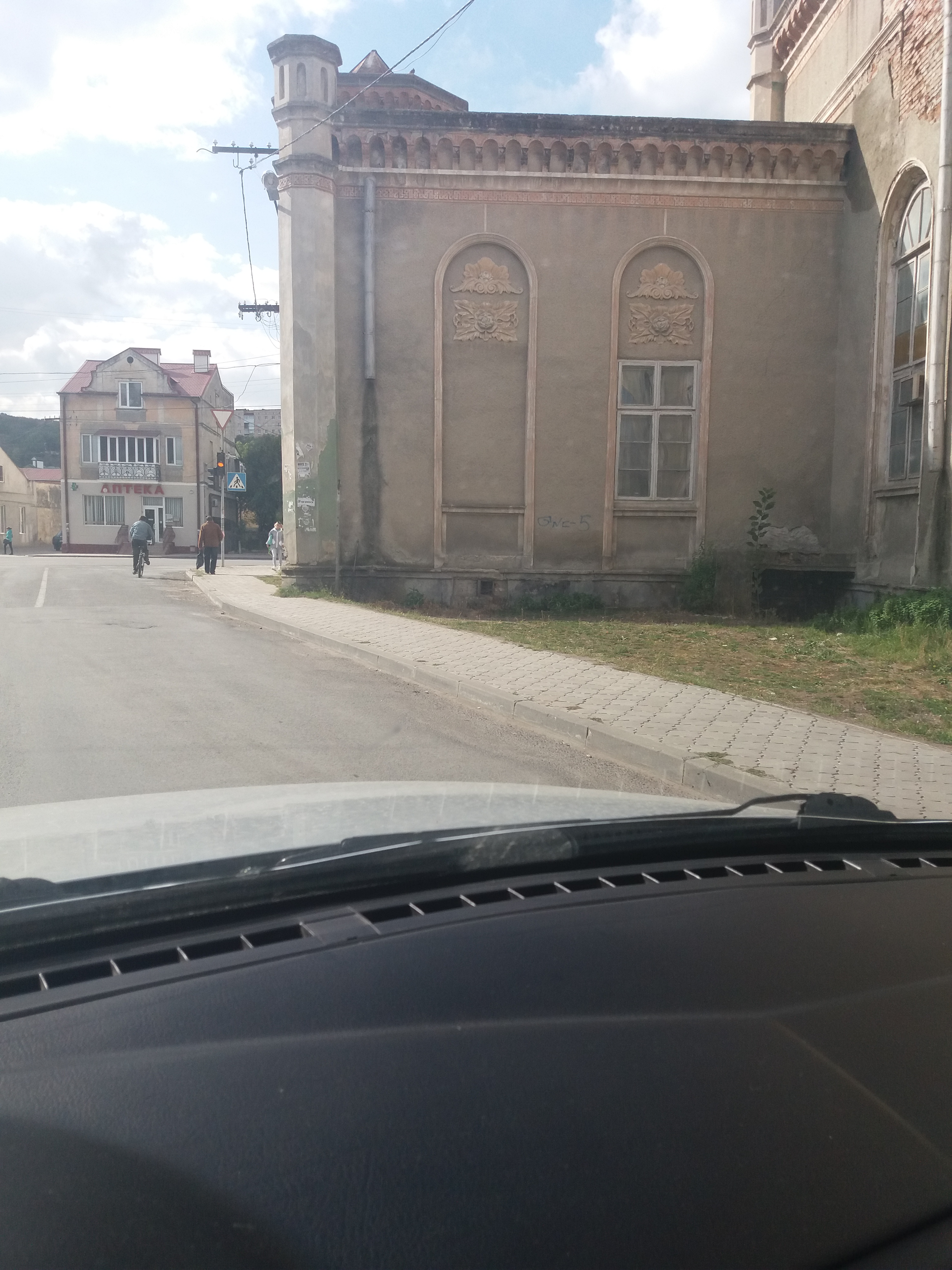 Синагога (мур.), Чортків, вул. Шевченка, 33